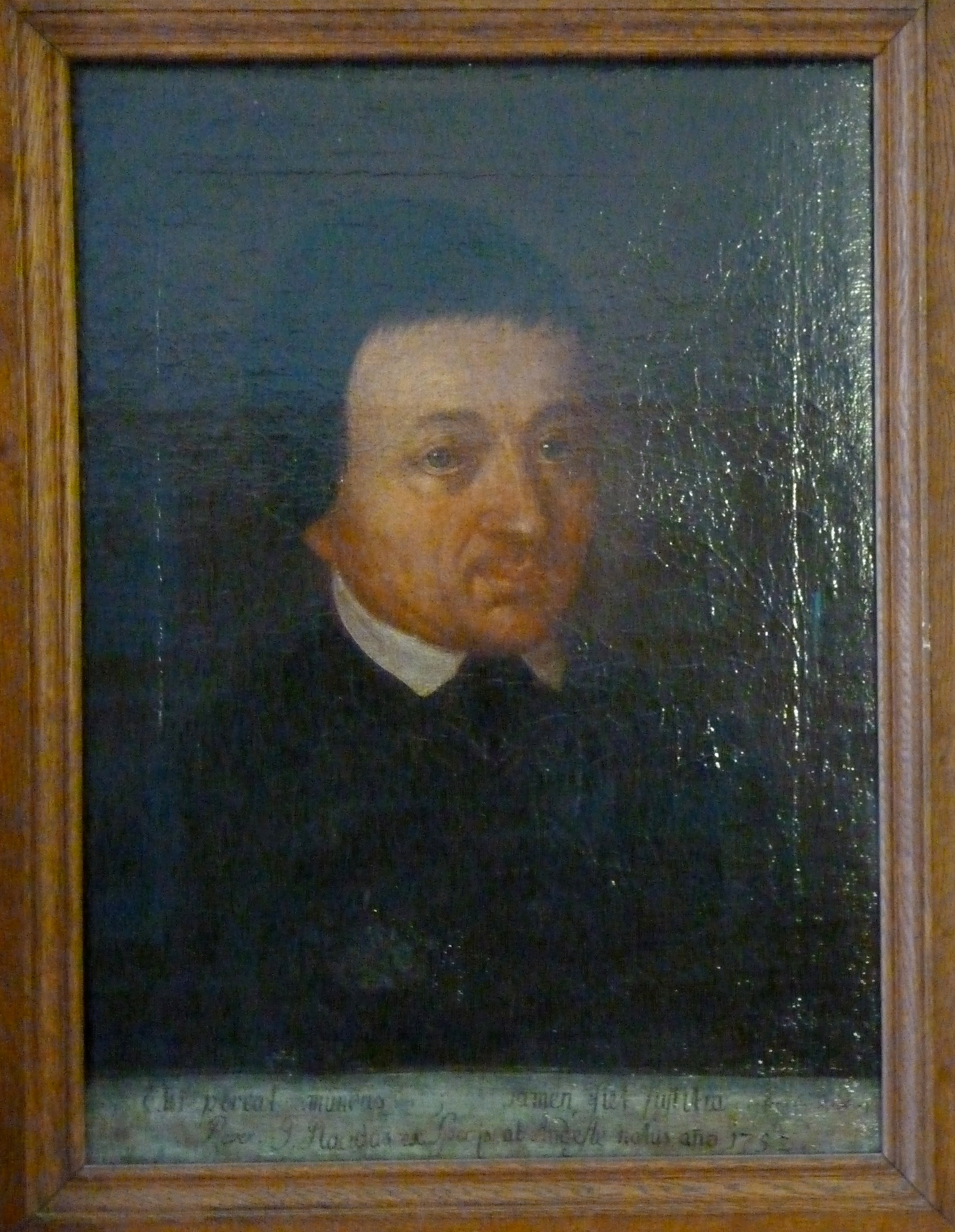 Placidus a Spescha; Ölbild im Rätischen Museum in Chur, (53x40 cm)